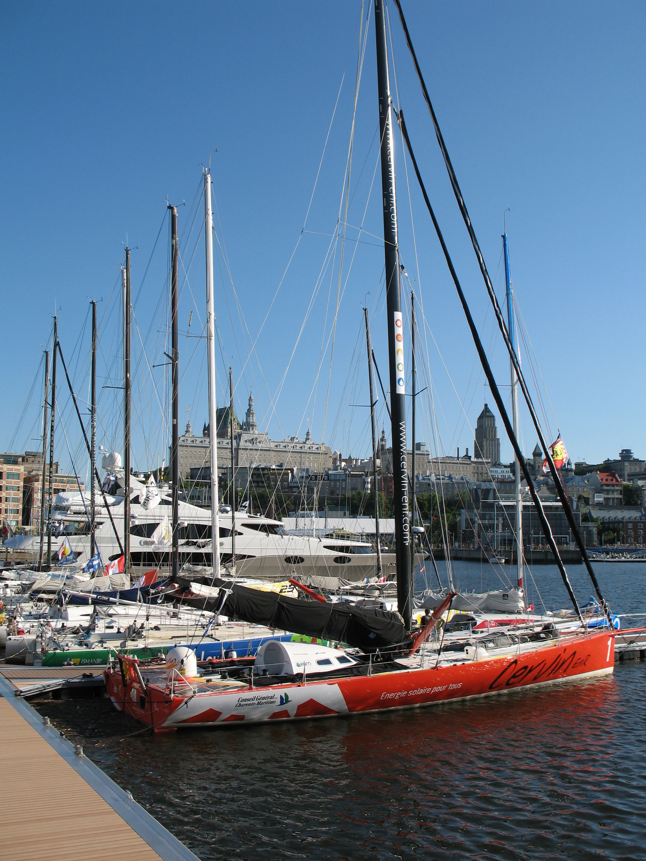 Bateaux de la Transat Québec-Saint-Malo amarrés au Vieux-Port de Québec, en juillet 2008. Au premier plan, le Cervin ENR de Yannick Bestaven qui arrivera deuxième en classe FICO le 5 août 2008 à Saint-Malo.